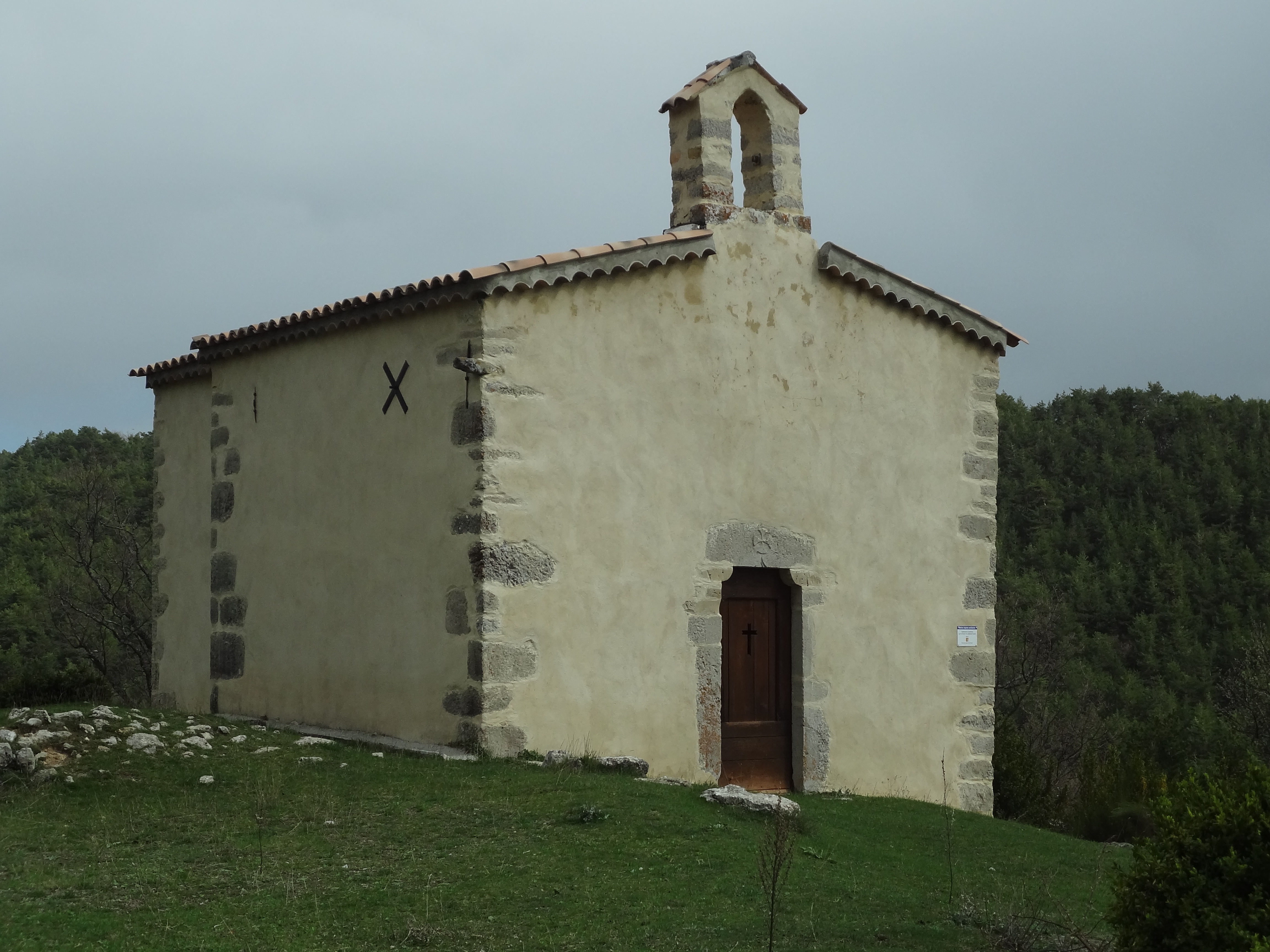 Chapelle Saint-Saturnin à La Rochette (Alpes-de-Haute-Provence), XIIe siècle, restaurée en 1999